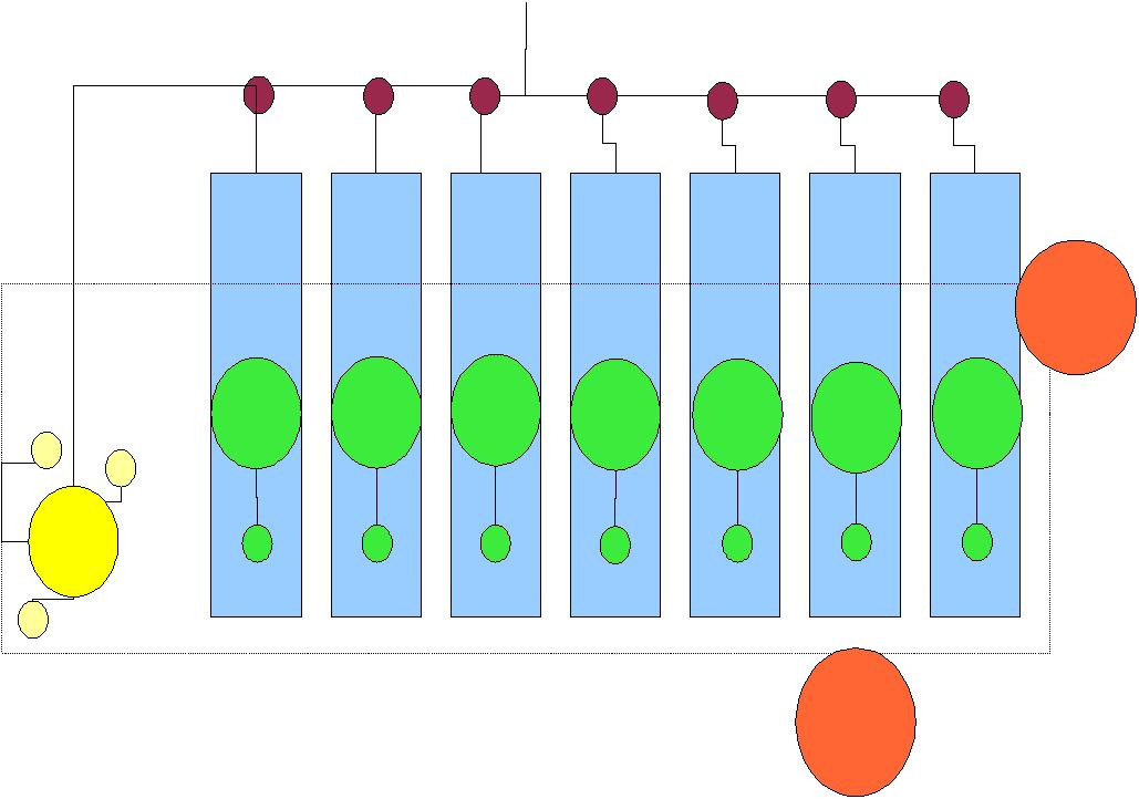 schéma d'une structure de projet fonctionnelle Benoit Minaudier